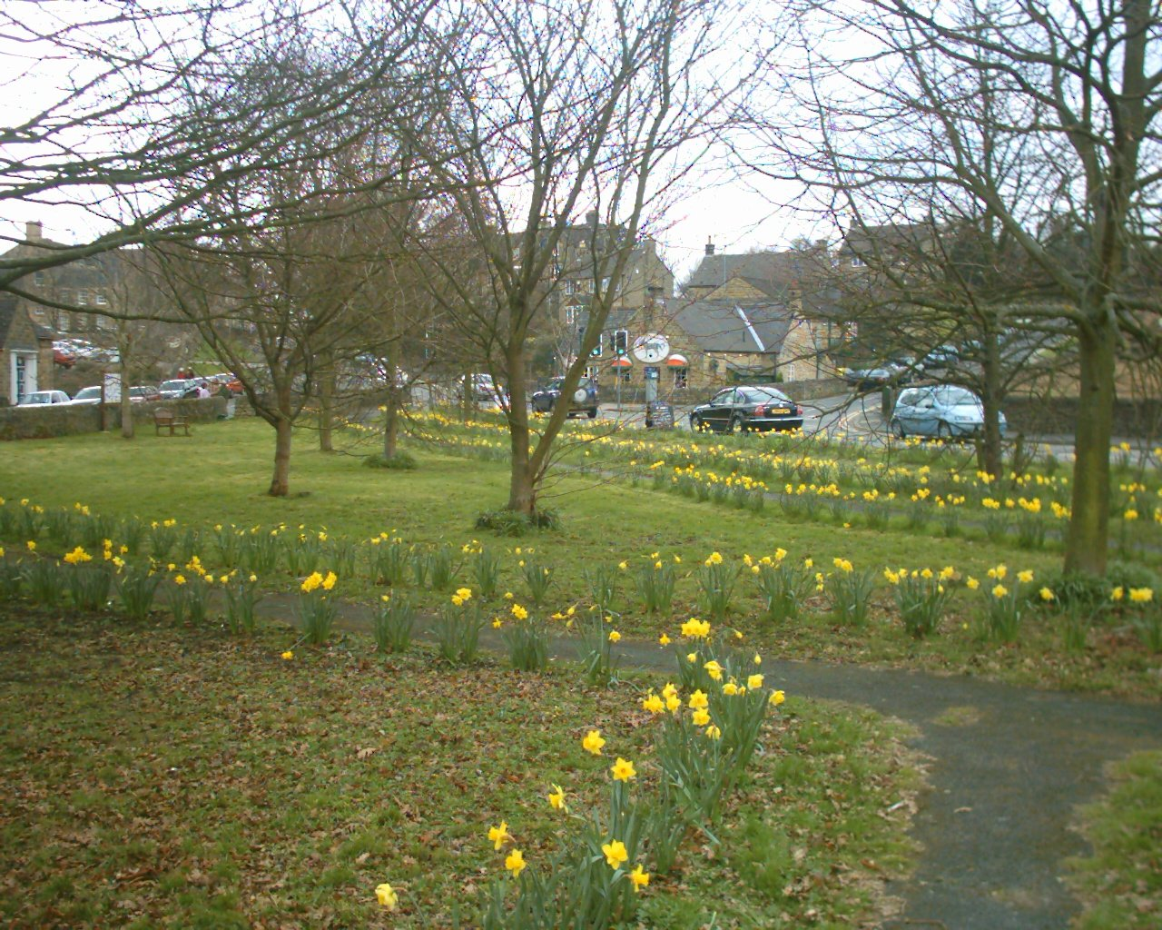 Village green, Baslow.